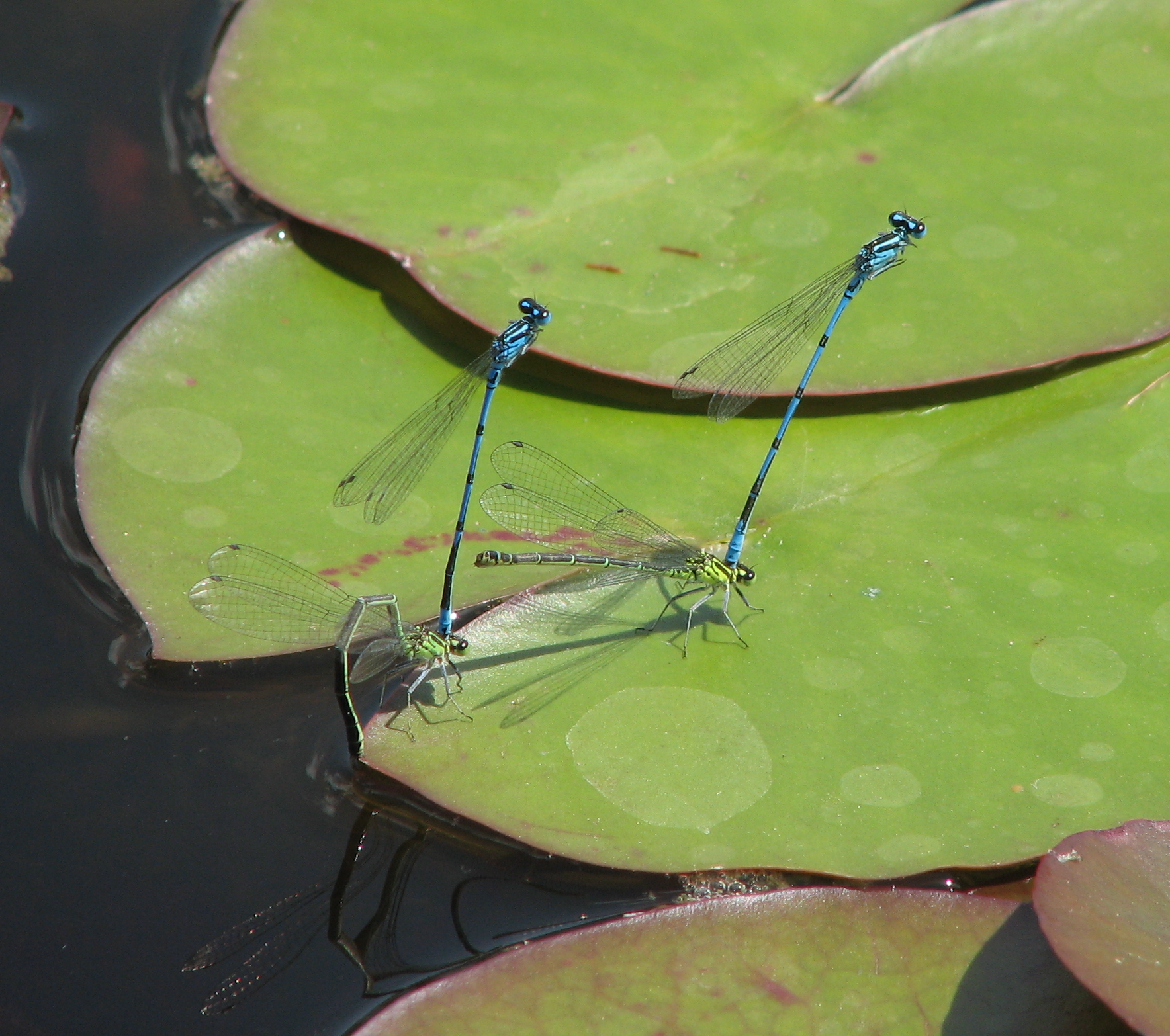 Tandems von Hufeisen-Azurjungfern (Coenagrion puella) bei der Eiablage